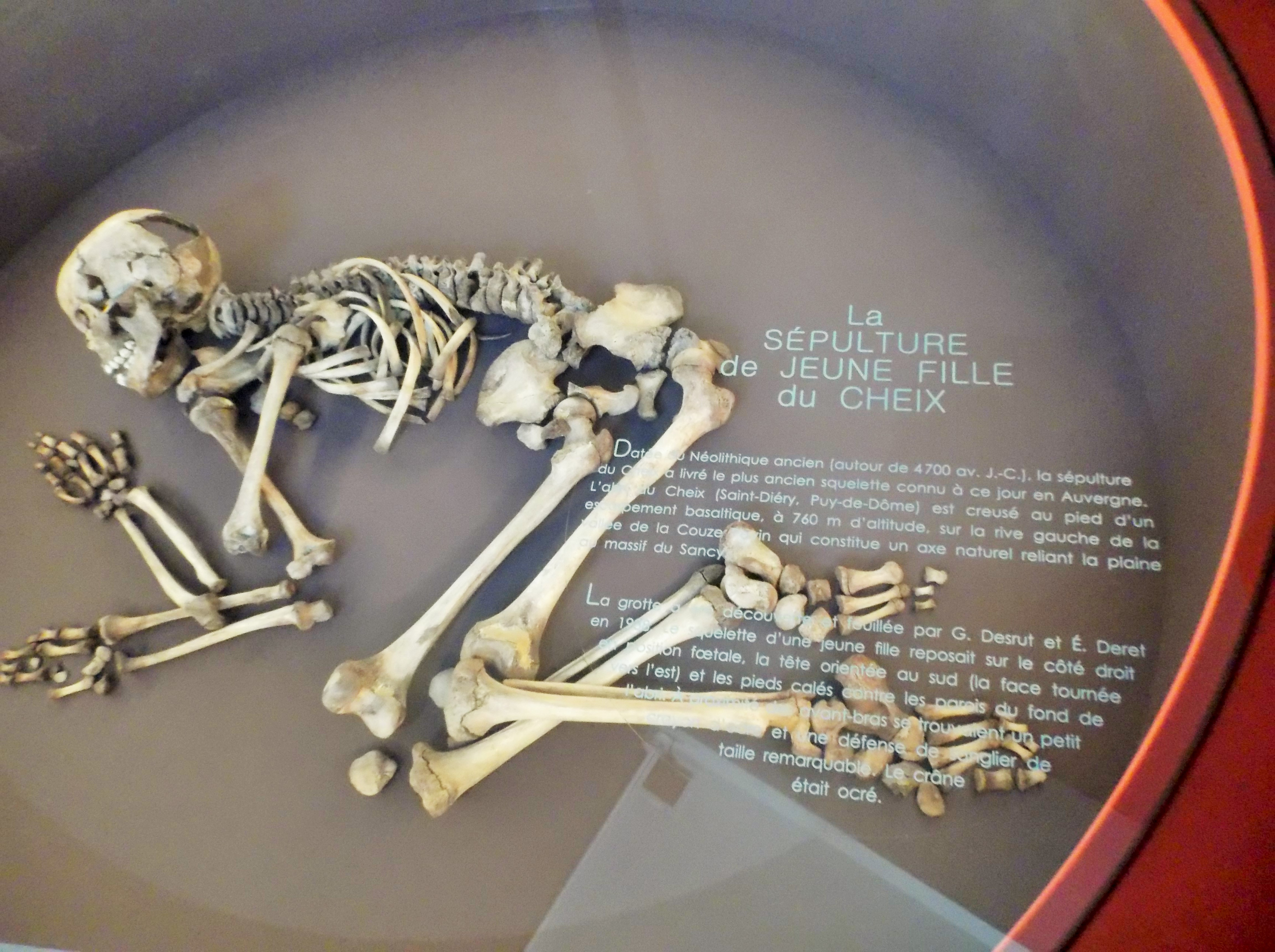 Squelette d'une jeune fille dite "jeune fille du Cheix". Musée Bargoin, dans la ville de Clermont-Ferrand, en France. La "jeune fille du Cheix" a été découverte dans une sépulture datant du Néolithique ancien (autour de 4700 avant J.-C.) au lieu-dit Cheix, à Saint-Diéry, dans le Puy-de-Dôme, en France. Il s'agit du plus ancien squelette connu à ce jour en Auvergne. La sépulture a été creusée à 760 m d'altitude, au pied d'un escarpement basaltique, sur la rive gauche de la vallée de la Couze (un ravin reliant la plaine au massif du Sancy). La grotte a été découverte et fouillée par G. Desrut et E. Deret en [1968, date à confirmer]. La sépulture abritait le squelette d'une jeune fille reposant sur le côté droit en position foetale, la tête orientée vers le sud, le visage tourné vers l'est, les pieds calés entre les parois du fond de l'abri. Près de ses avant-bras se trouvait un petit crayon d'ocre et une défense de sanglier de taille remarquable. Son crâne était ocré.